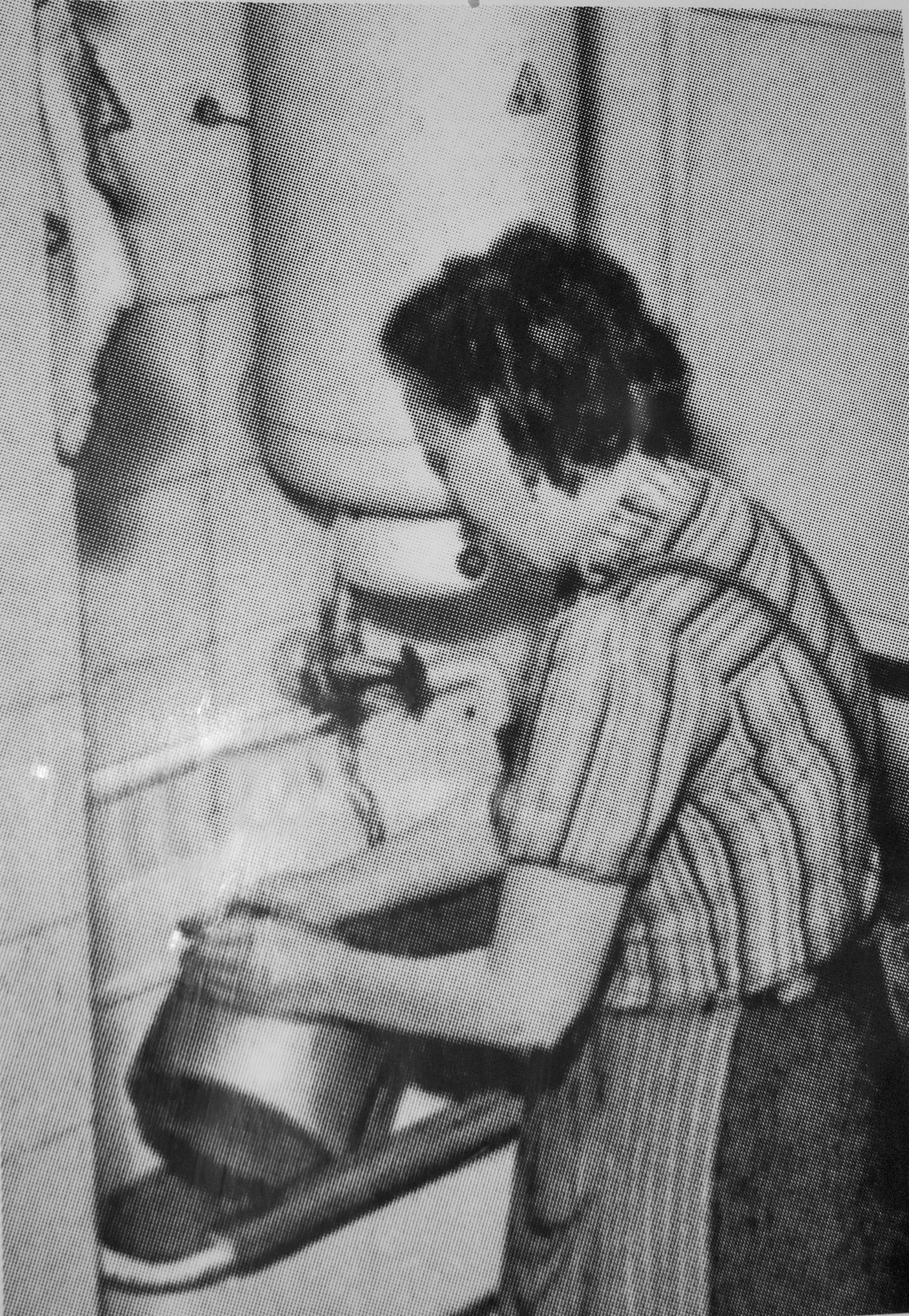 housework